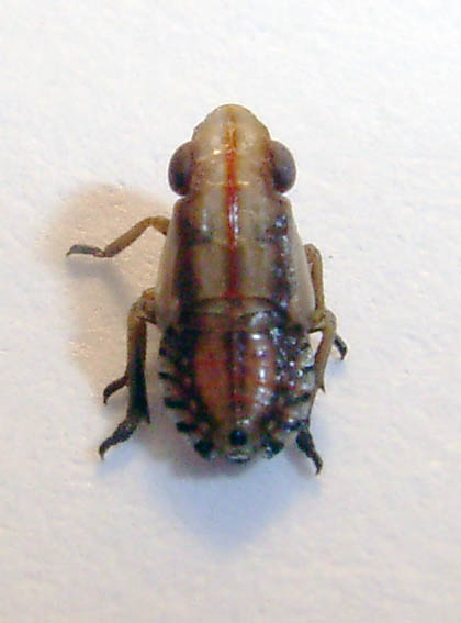 Larve einer Moorkäferzikade (Ommatidiotus dissimilis), Präparat